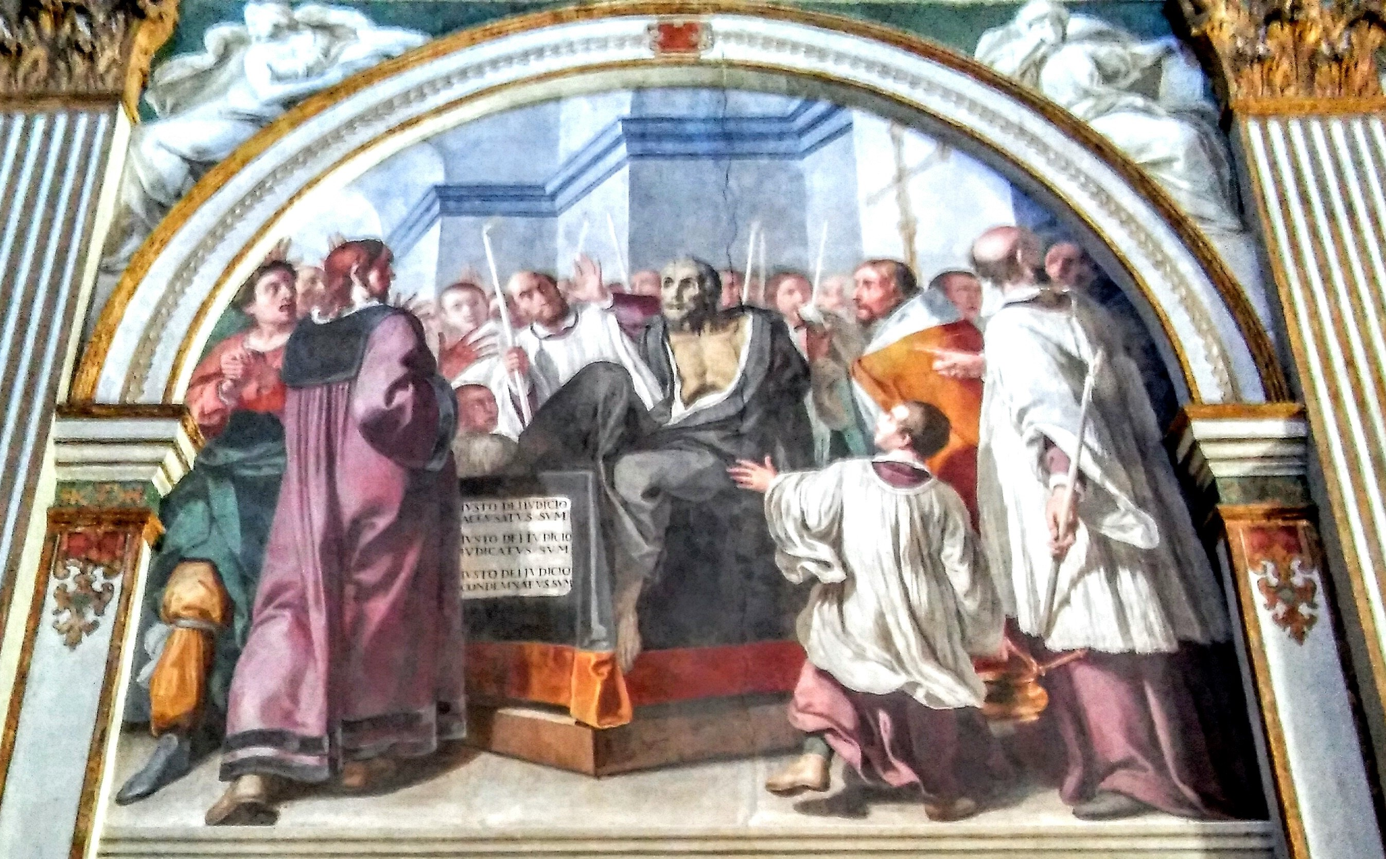 Affreschi nella Certosa di Garegnano: Funerale di Raimond Ducres di Daniele Crespi